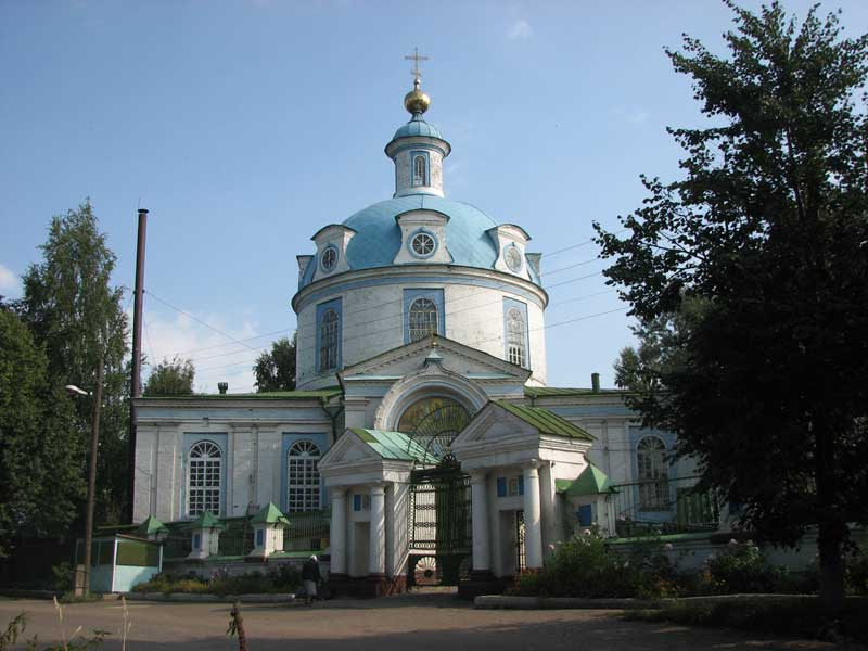 Успенский Кафедральный Собор города Яранска